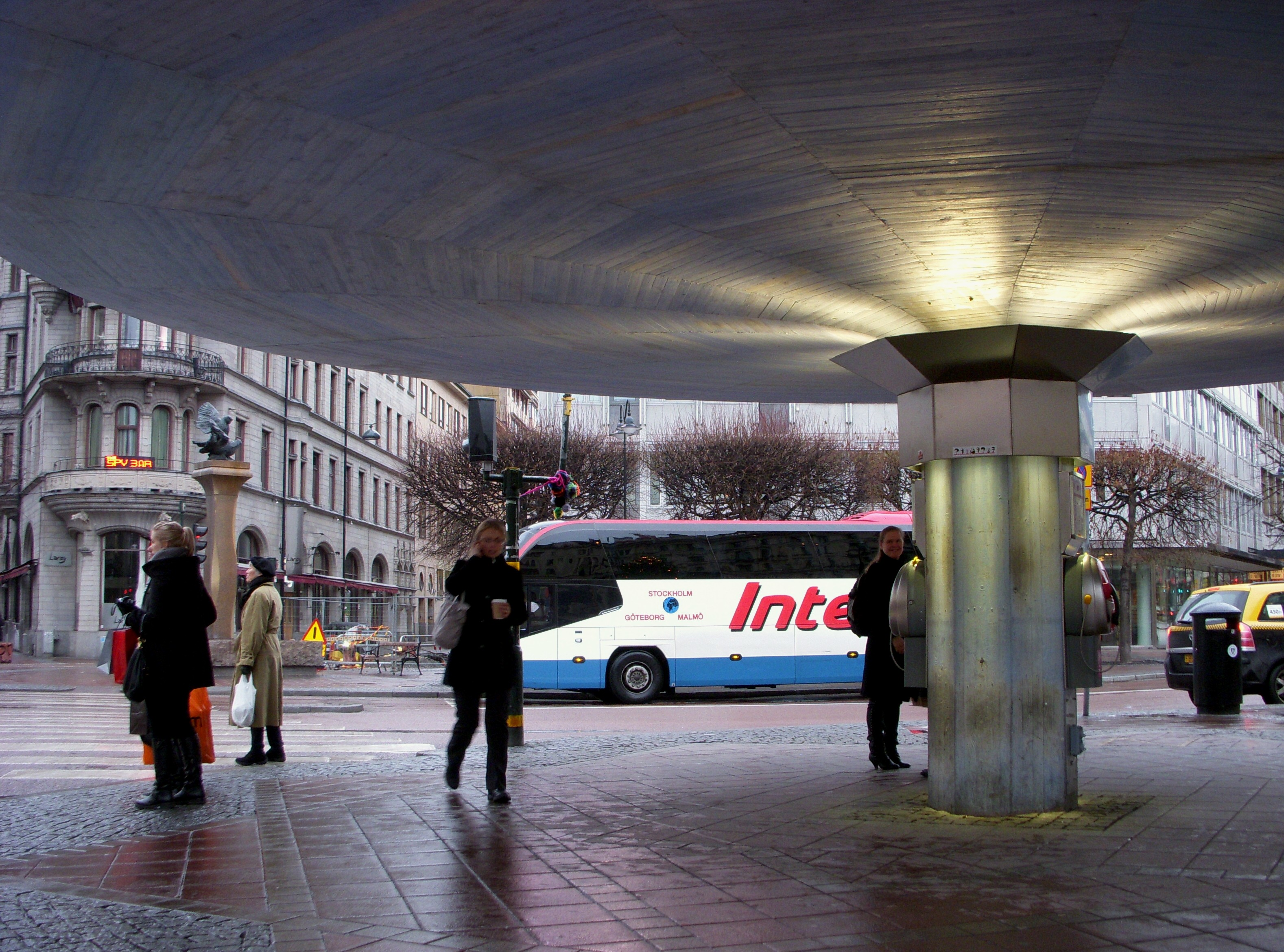 "Svampan" på Stureplan i Stockholm